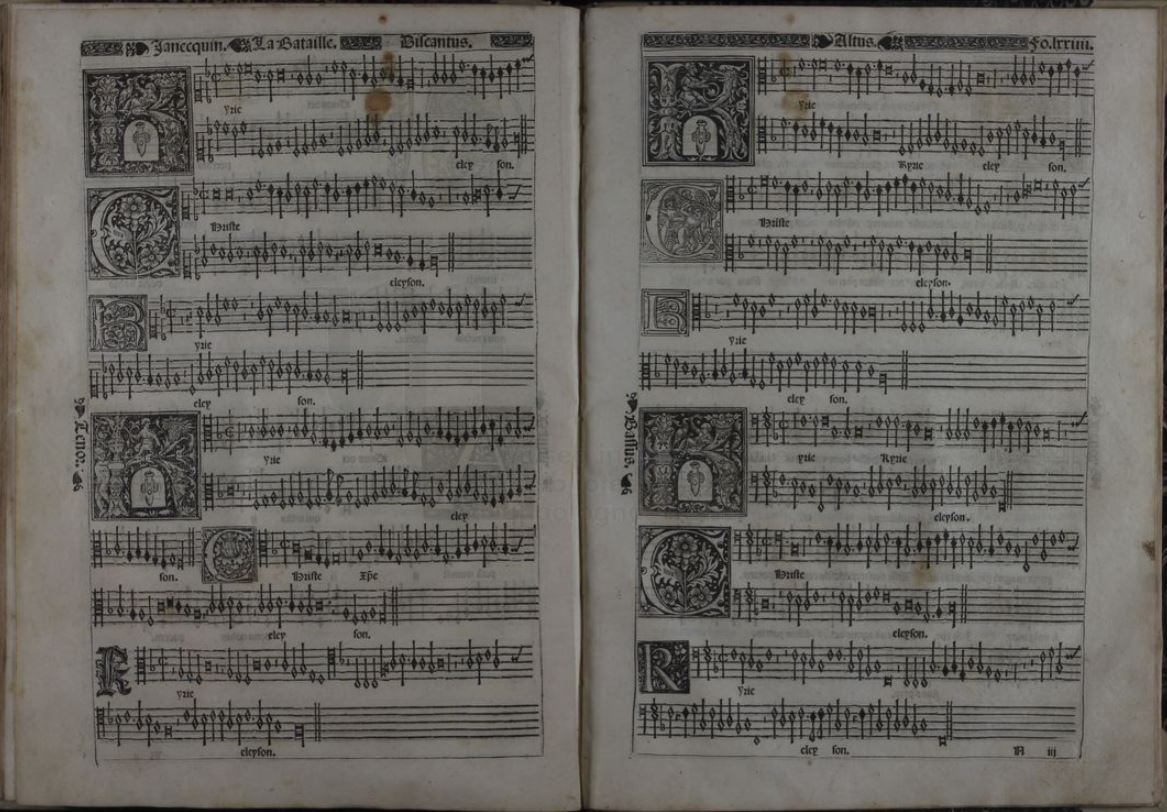 Début de la messe La Bataille (Lyon, 1532).